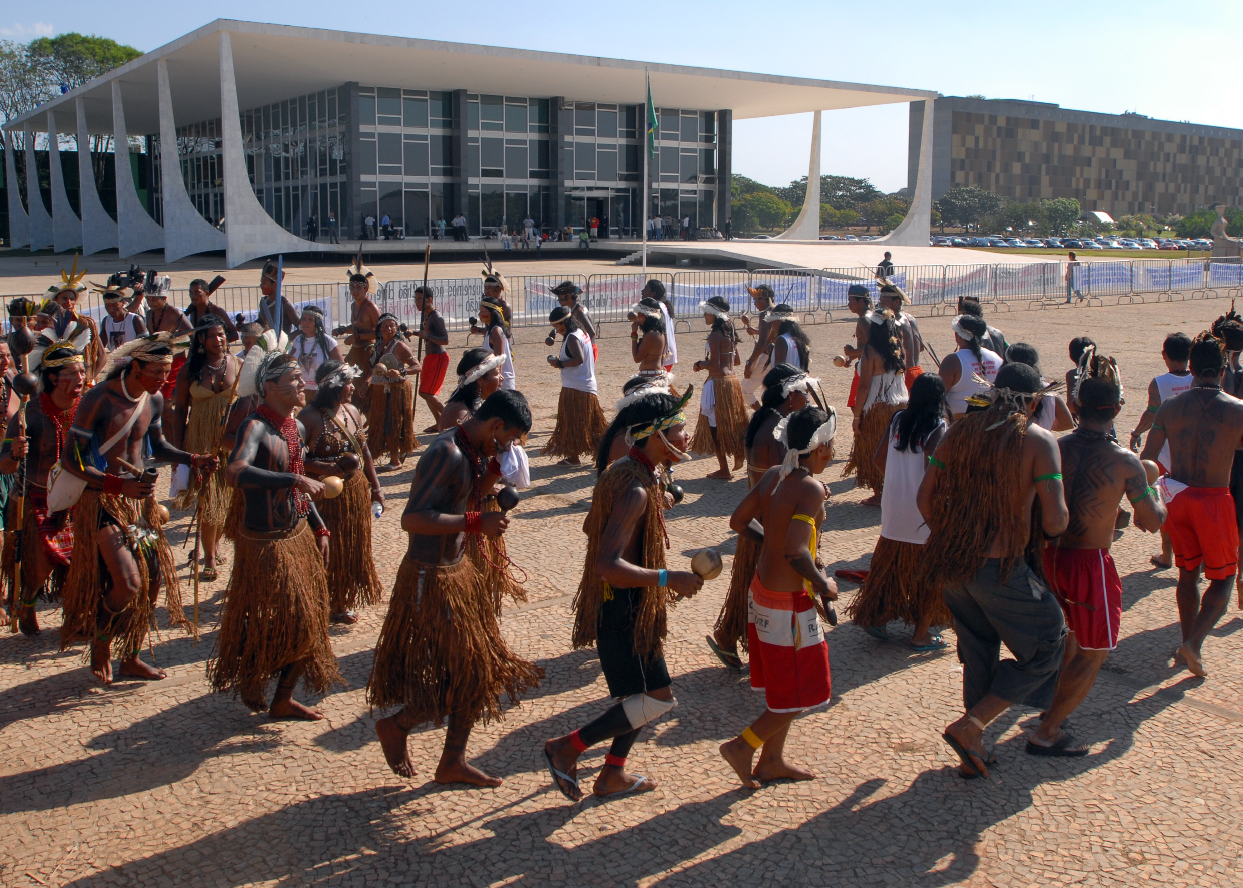 Original: Brasília - Índios fora do Supremo Tribunal Federal (STF) durante julgamento de ação em que a Fundação Nacional do Índio (Funai) pede que sejam declarados nulos os títulos de propriedade sobre imóveis rurais na Terra Indígena Caramuru-Paraguaçu, na Bahia.